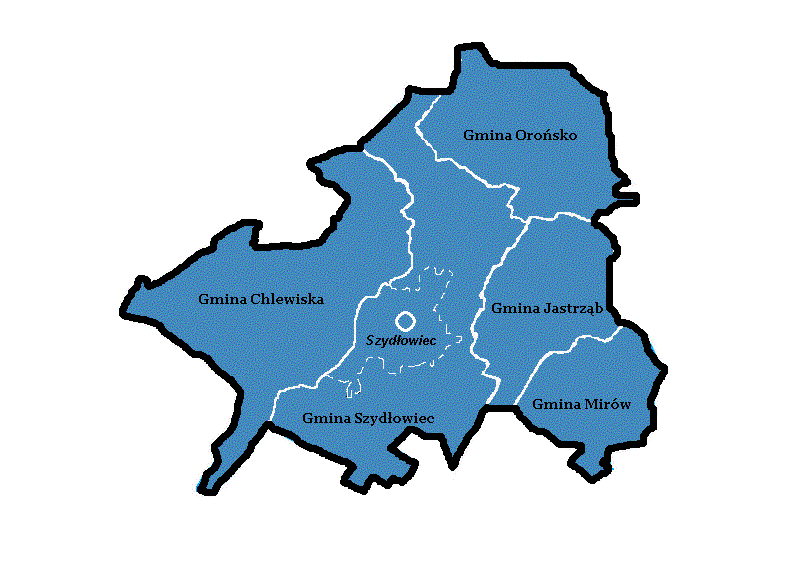 Mapa powiatu szydłowieckiego